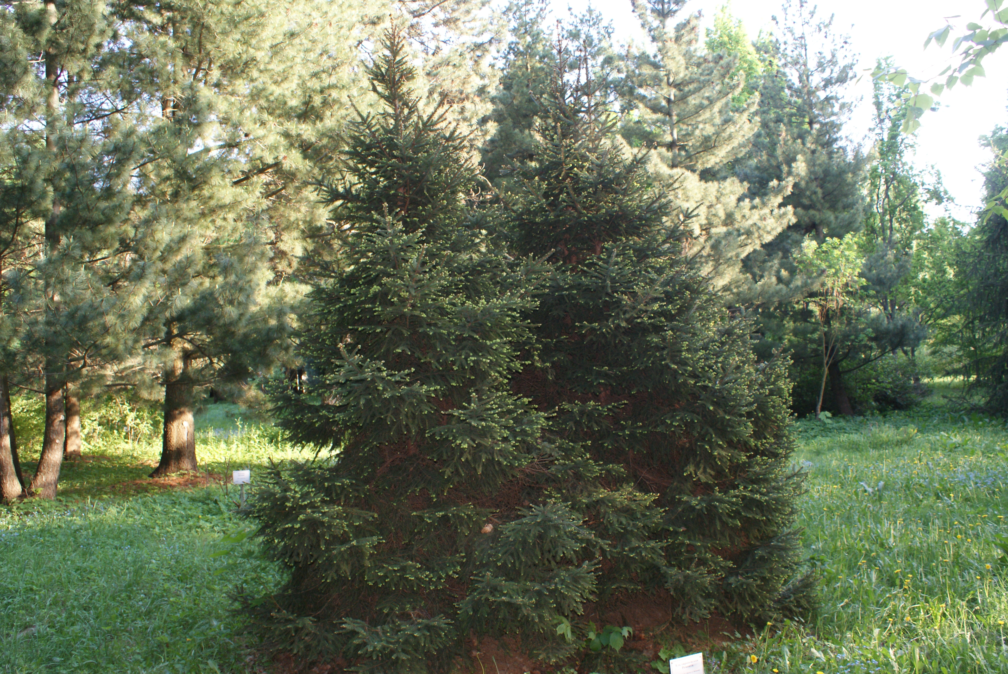 Picea abies cv. Remontii in Botanical garden, Minsk